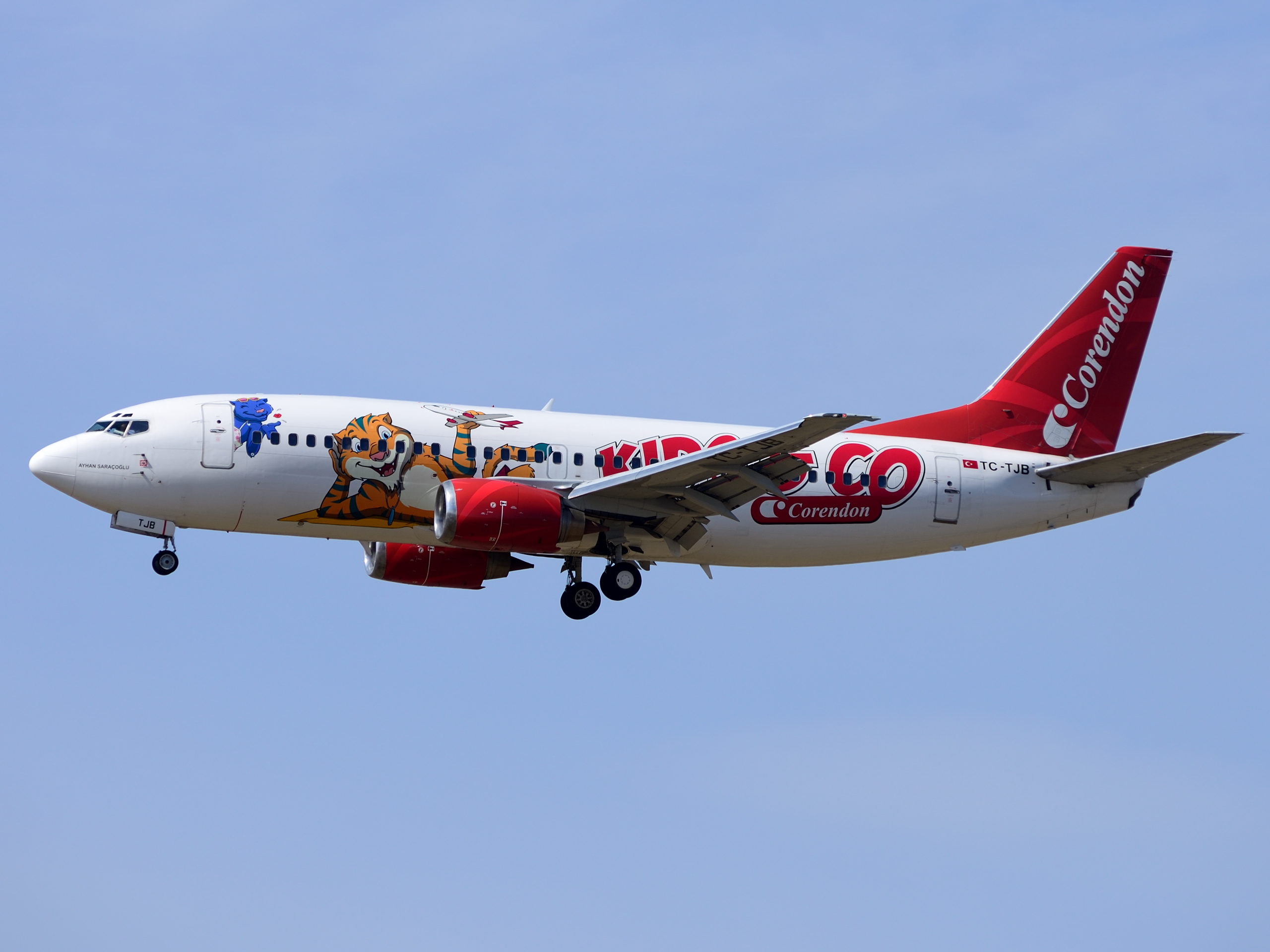 Corendon Kids and Co B737-300 TC-TJB